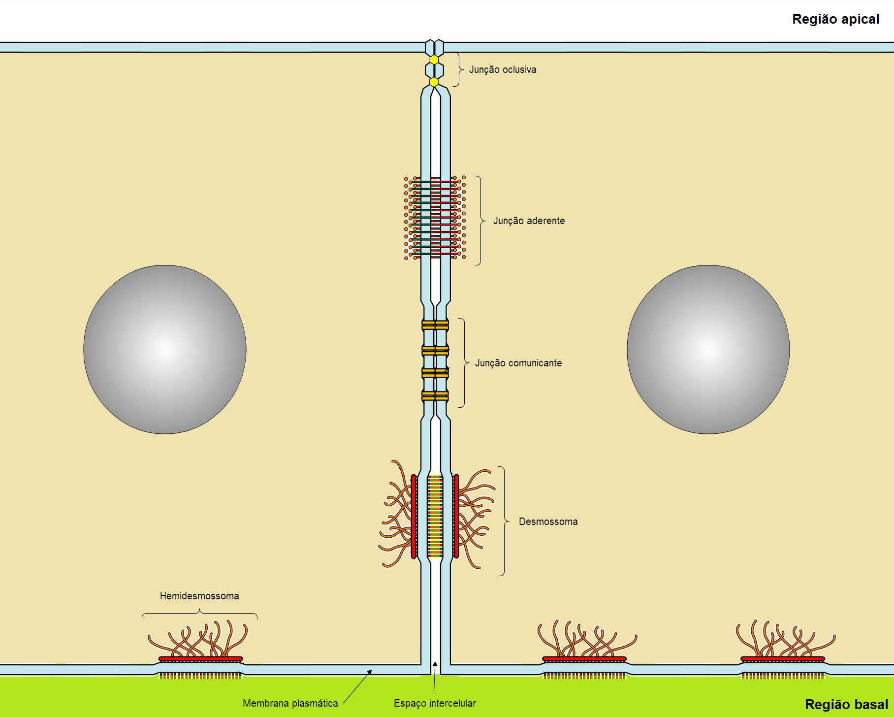 Estruturas juncionais